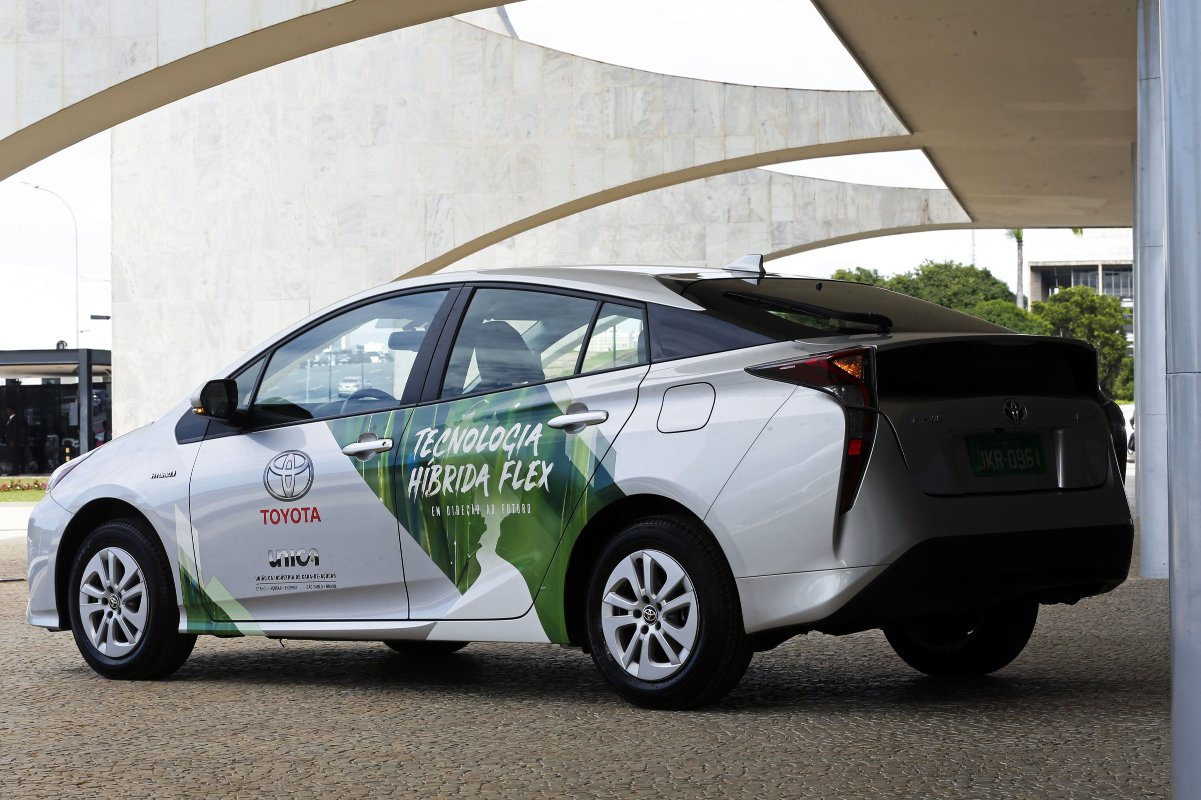 Carro Prius flex no Palácio do Planalto, Brasília, Brazil.